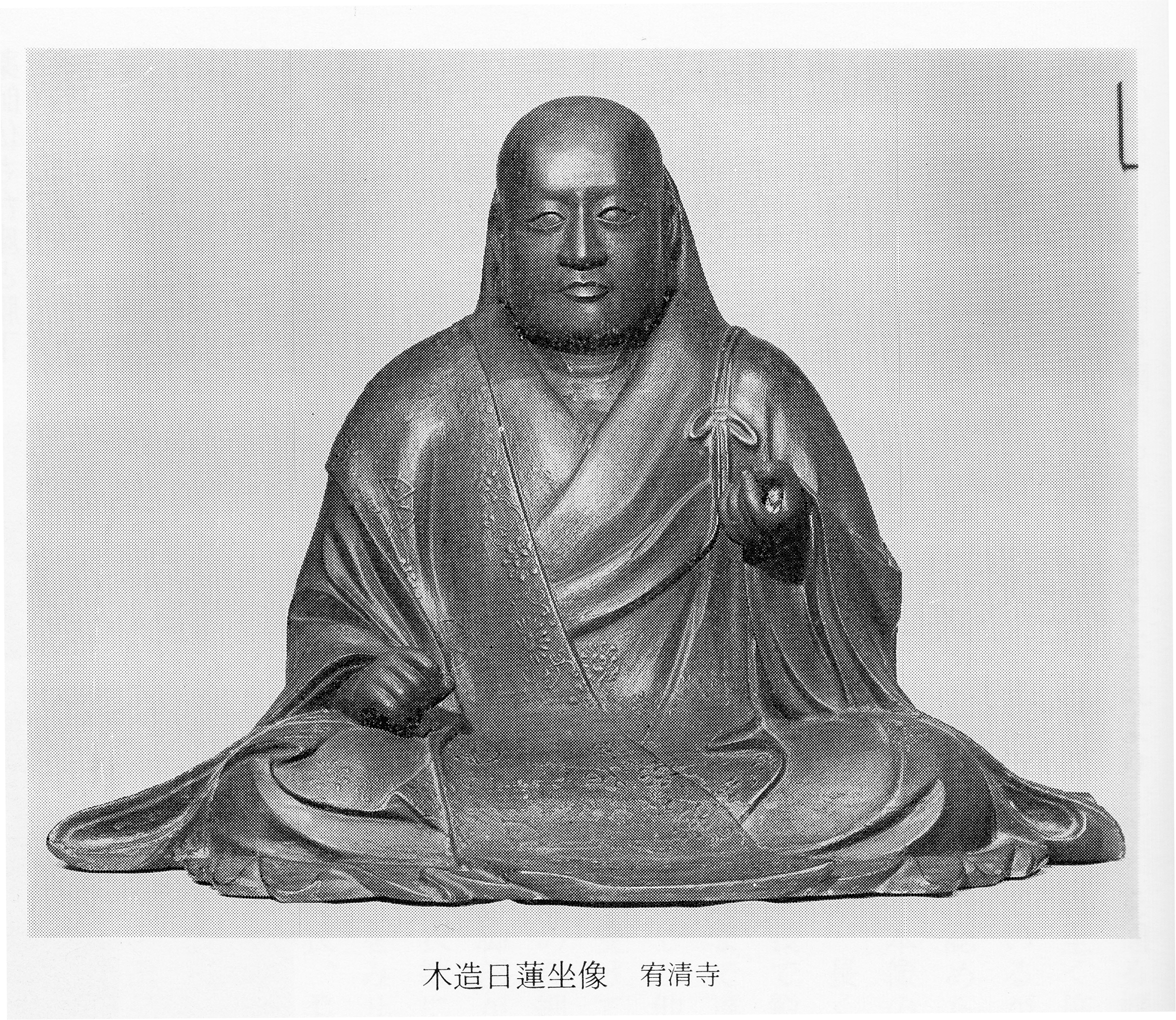 宥清寺 御影